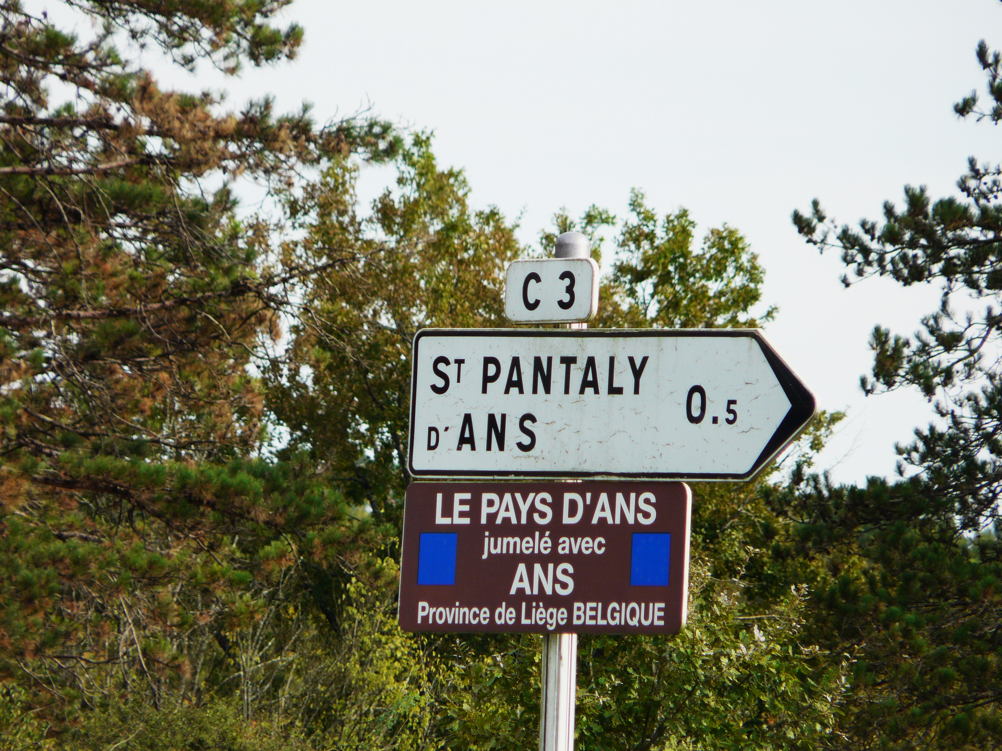 Panneau de jumelage de Saint-Pantaly-d'Ans, Dordogne, France.